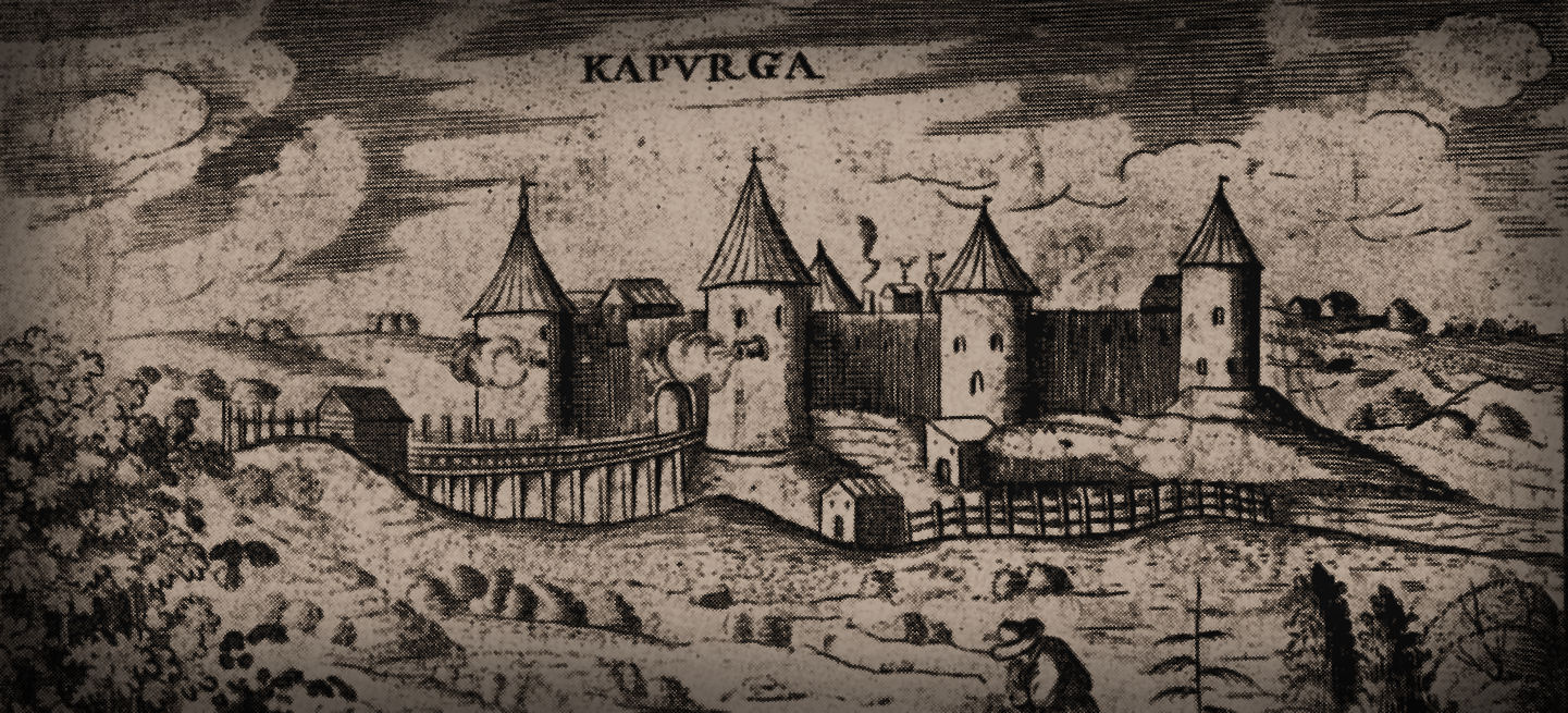 Kaprion Linna 30-vuotisen sodan ajalta